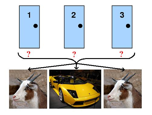 *Graphique de présentation générale du problème de Monty Hall La chèvre est issue de wikicommons : La voiture vient d'une photographie personnelle prise en 2004 au salon de l'automobile à Paris. Les portes sont issues du wikipédia anglais